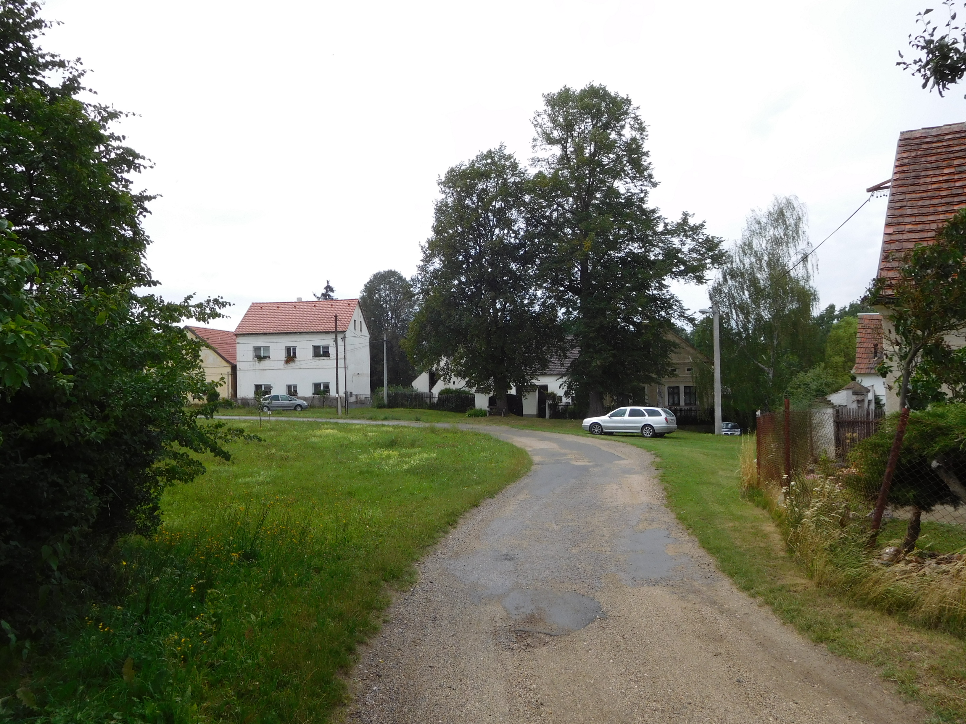 Rájov - střed obce